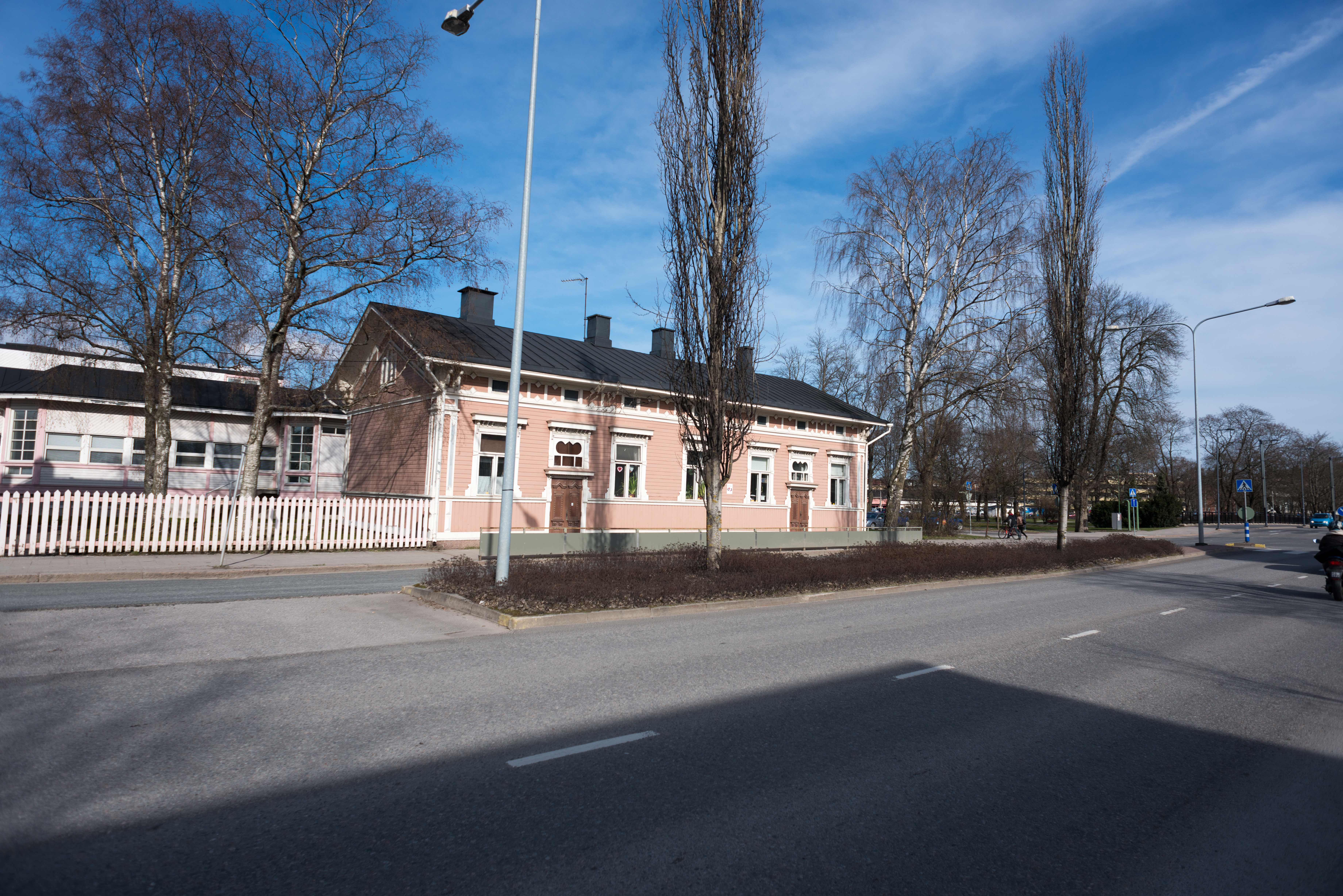 Mariankatu 1 salo